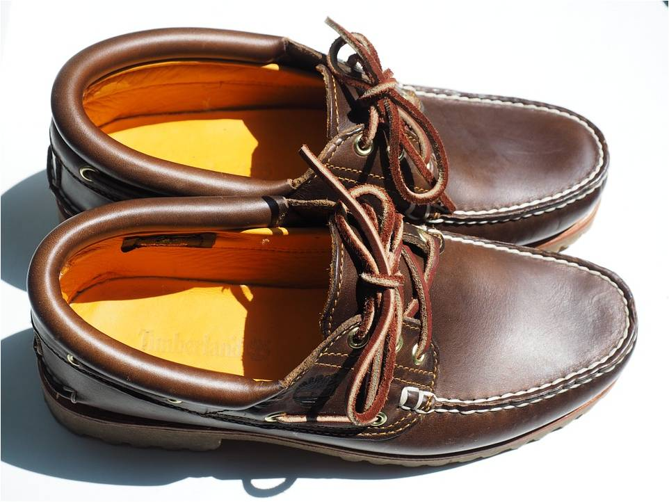 구두